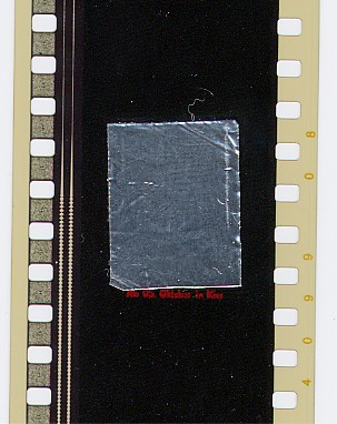 35 mm-Film mit Folie